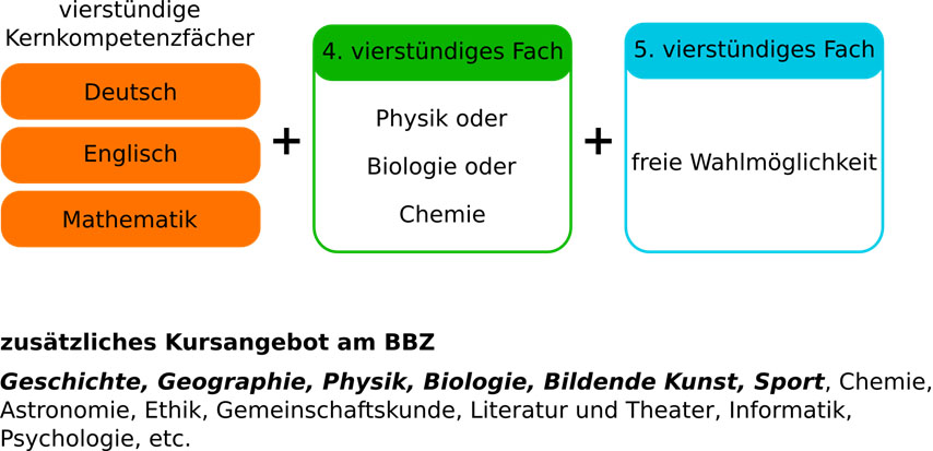 Das Kursangebot in der Oberstufe am Gymnasium des BBZ.